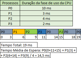 Algoritmo Round Robin feito no Excel